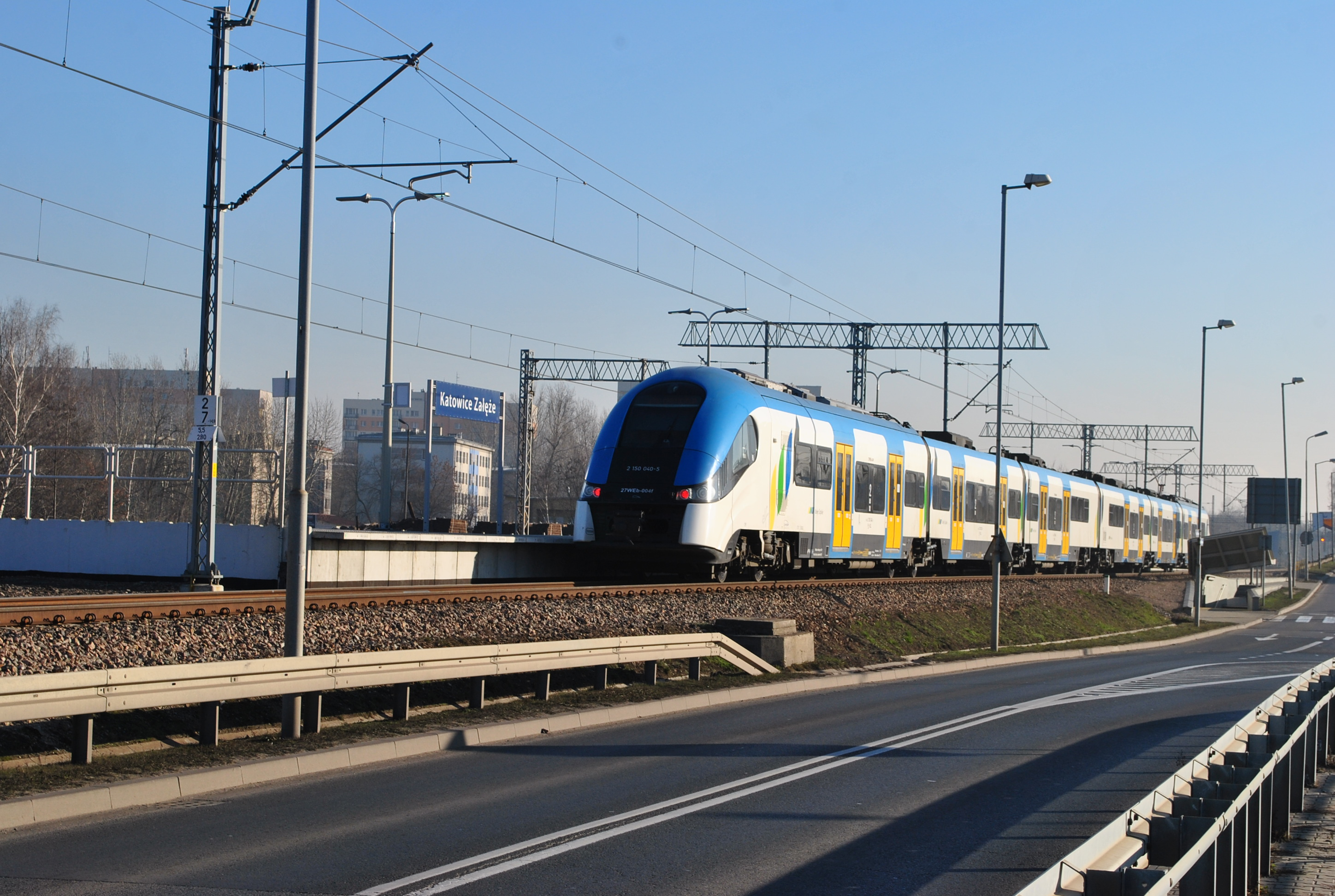 Przystanek kolejowy Katowice Załęże. 27WEb Kolei Śląskich na przystanku